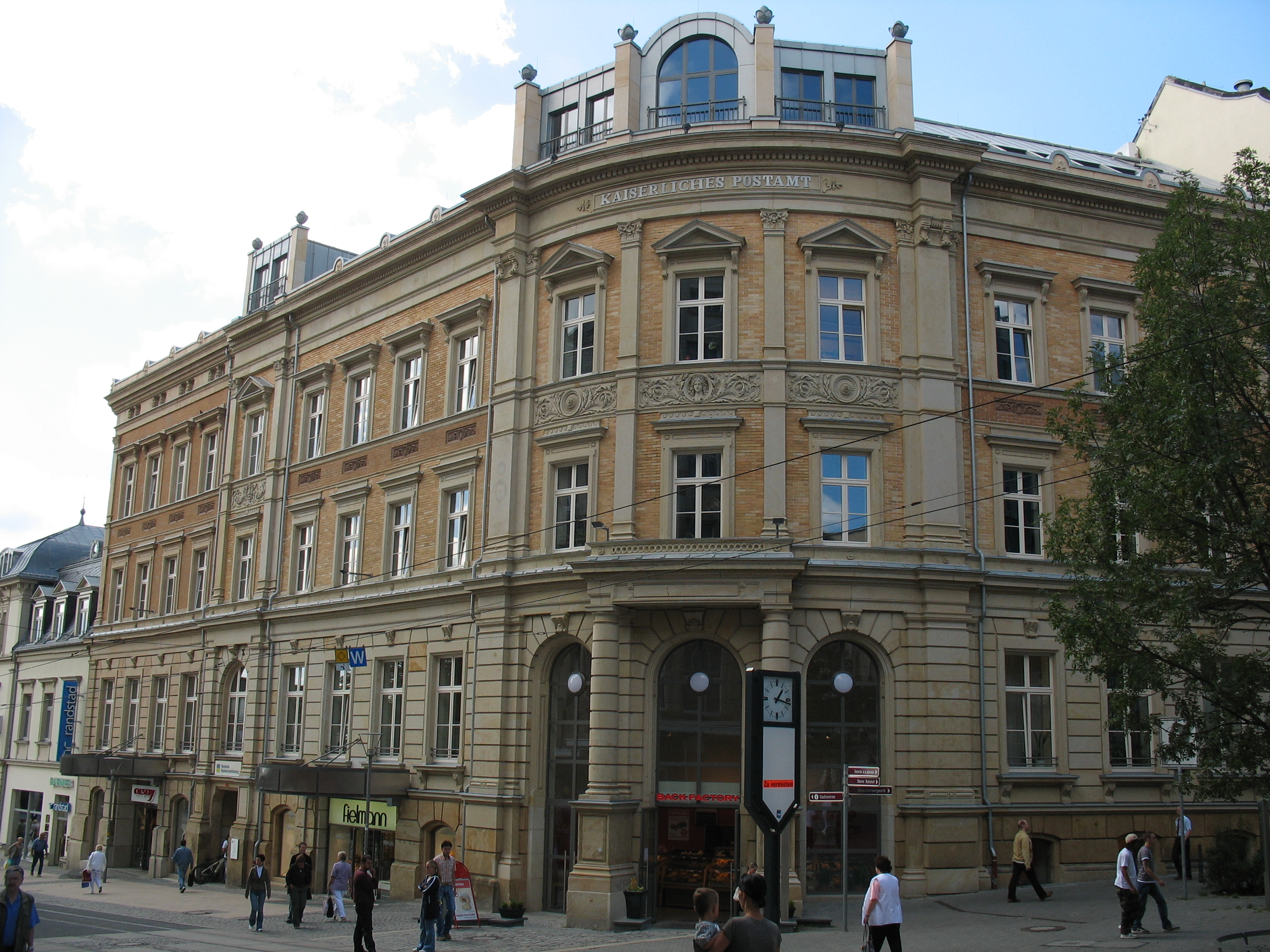 Plauen, denkmalgeschütztes Haus am Postplatz, (Postplatz 3-4), ehemaliges Hauptpostamt